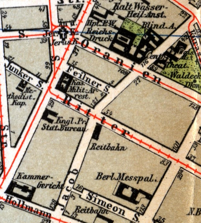 Berlin-Kreuzberg, Lehr-Escadron-Kaserne (preuß. Militärarrest), Kartenausschnitt "Berlin und seine Bauten", Verlag Wilhelm Ernst & Sohn 1896